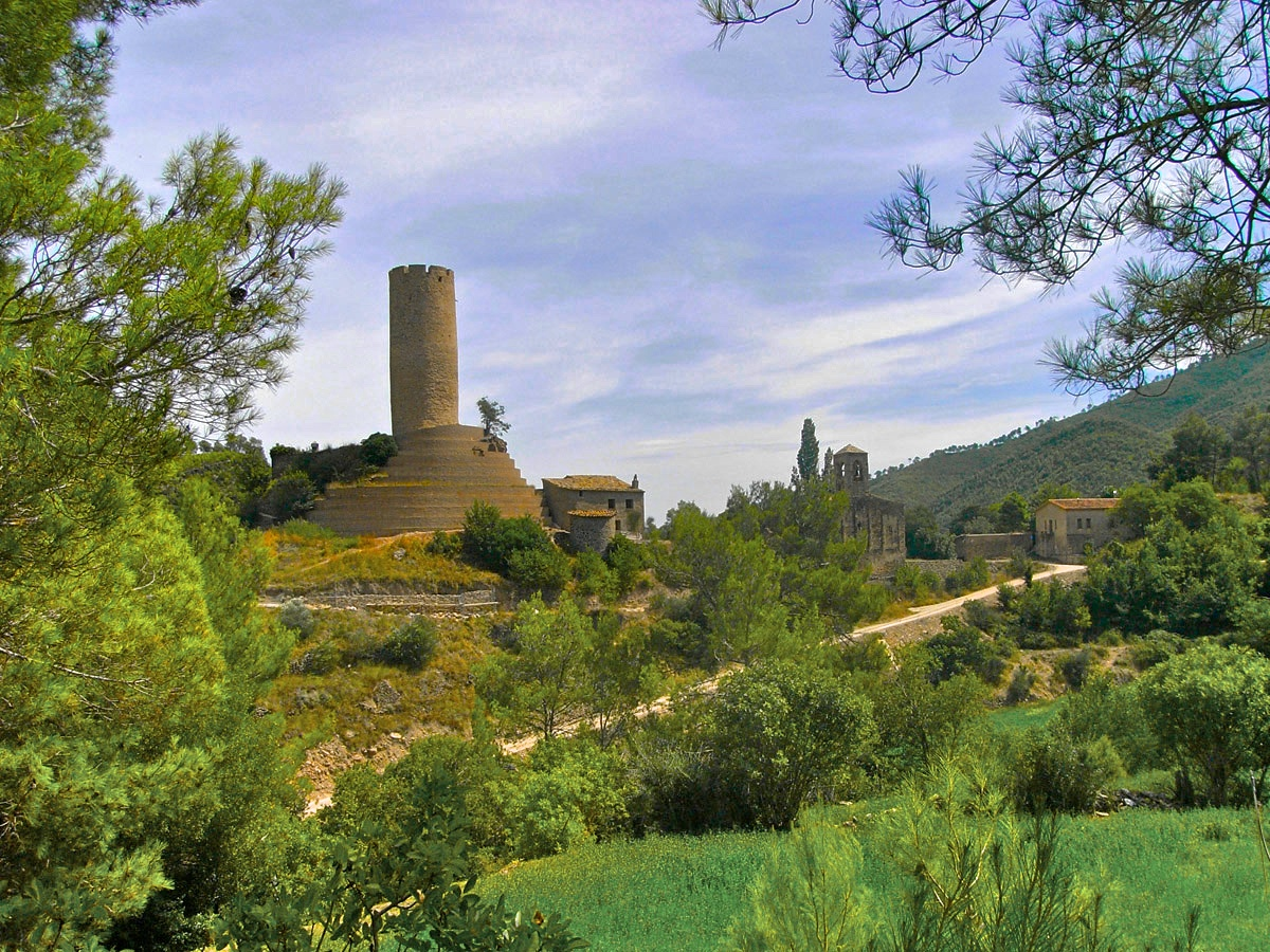 Castell i església de Coaner